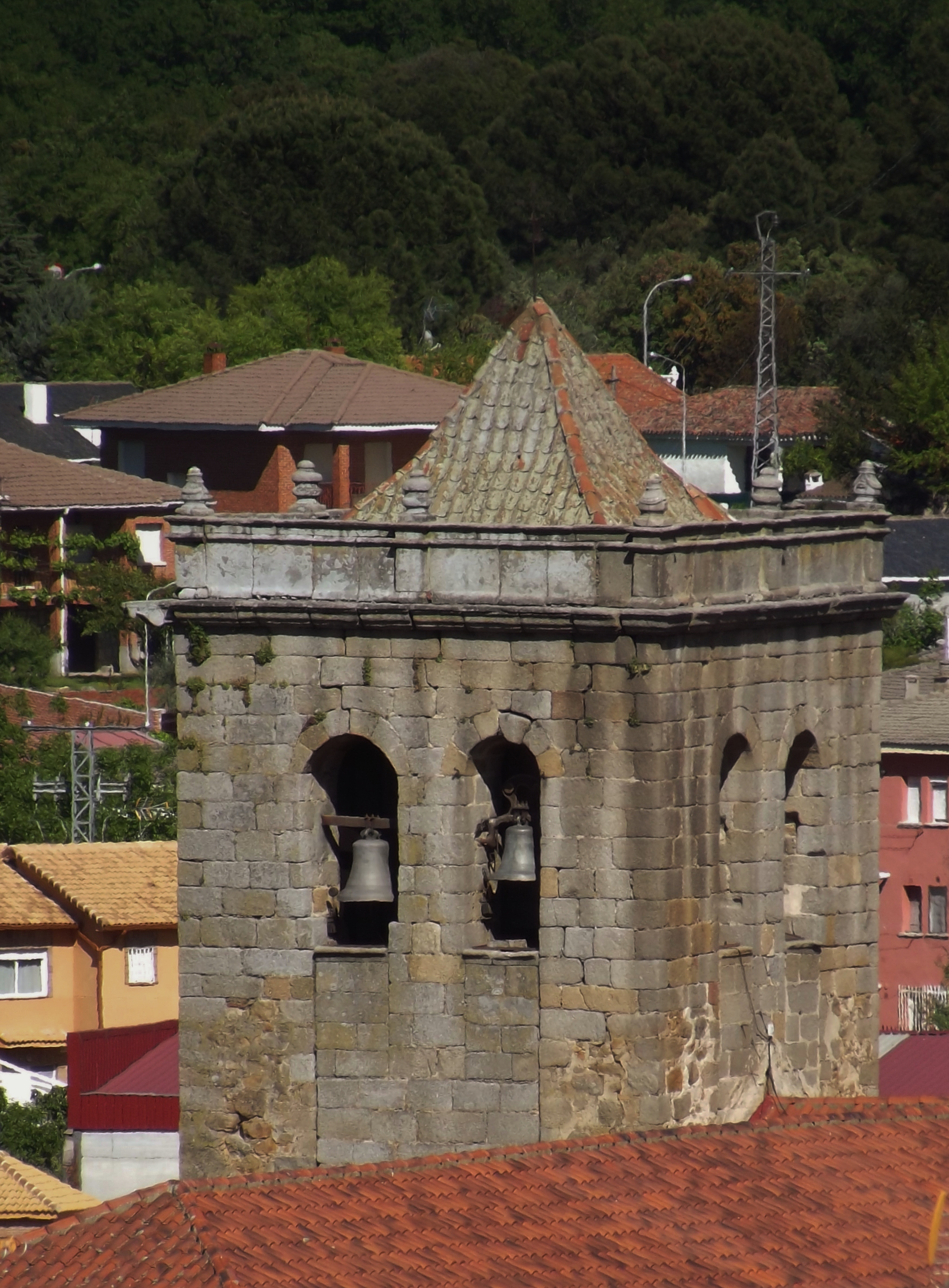 Vista del campanario de la iglesia de La Adrada.